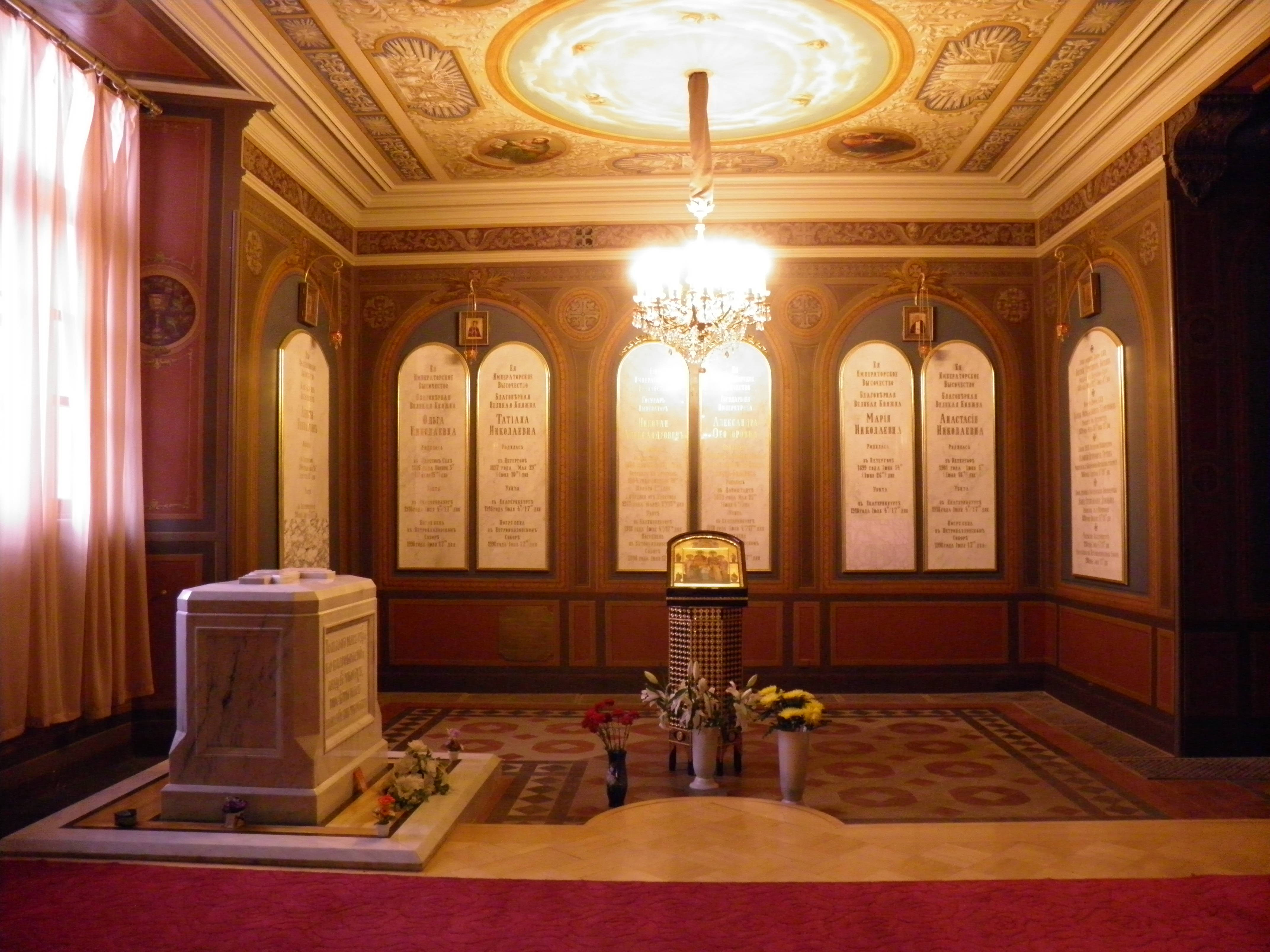 Chapelle de Sainte-Catherine à l'intérieur de la cathédrale Saints-Pierre-et-Paul dans la forteresse Pierre-et-Paul à Saint-Pétersbourg (Russie).